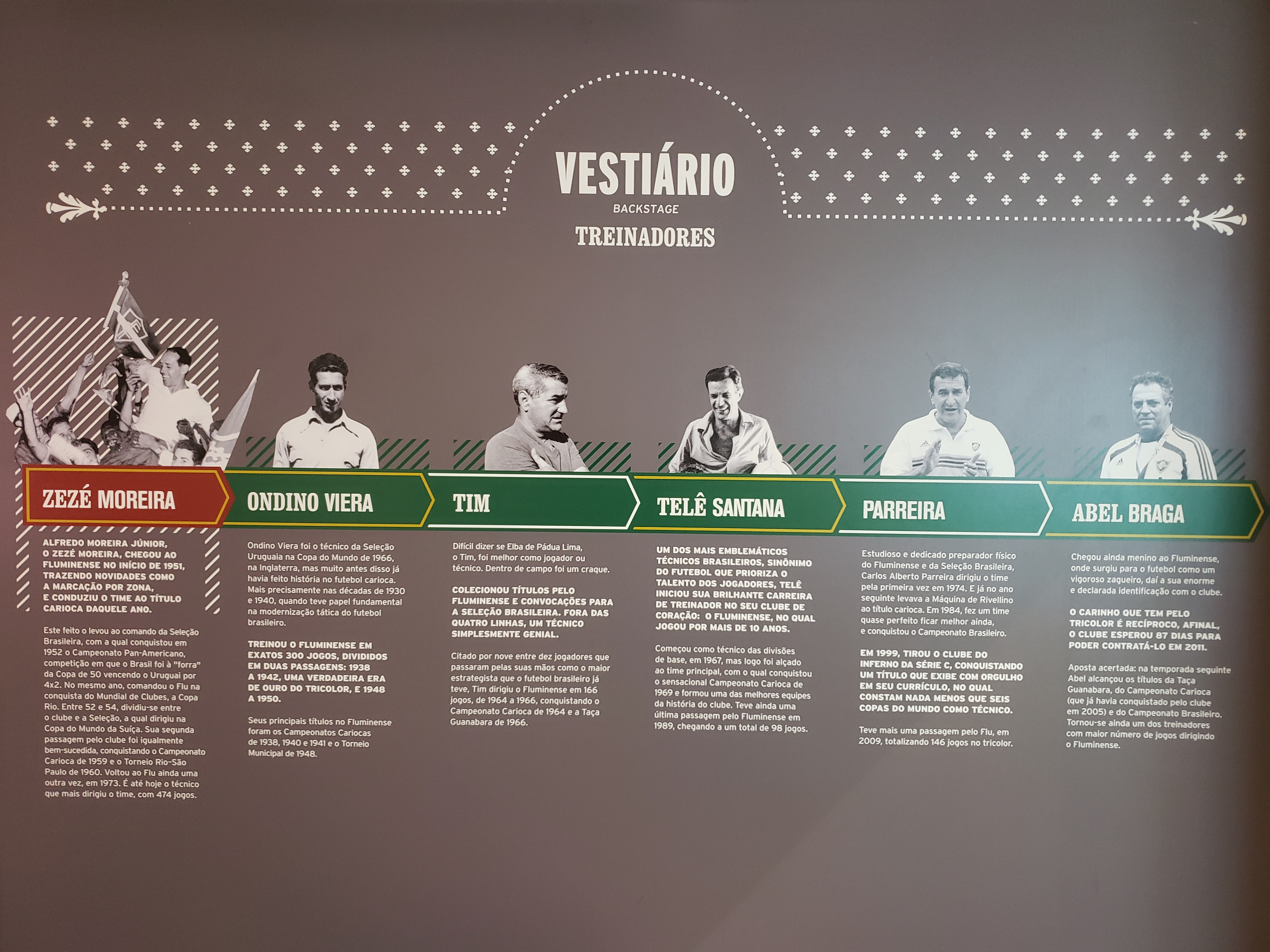 Treinadores do Fluminense em destaque na Sala de Troféus do clube.